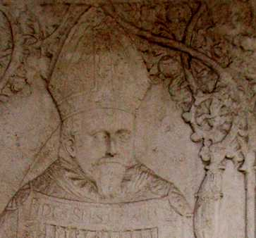 Johann Konrad von Gemmingen Fürstbischof von Eichstätt Portrait auf Grabplatte im Eichstätter Domkreuzgang